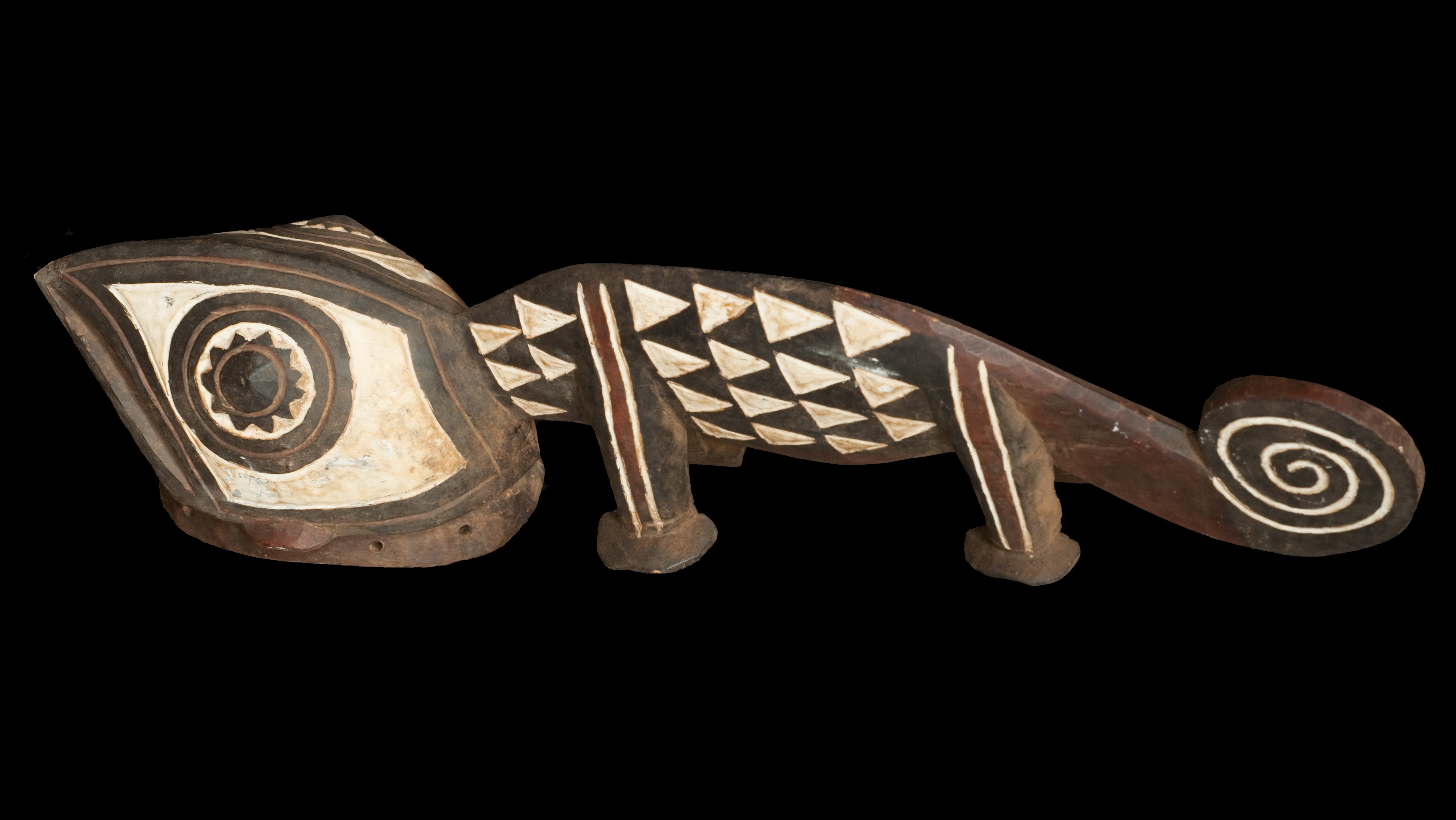 Masque de caméléon